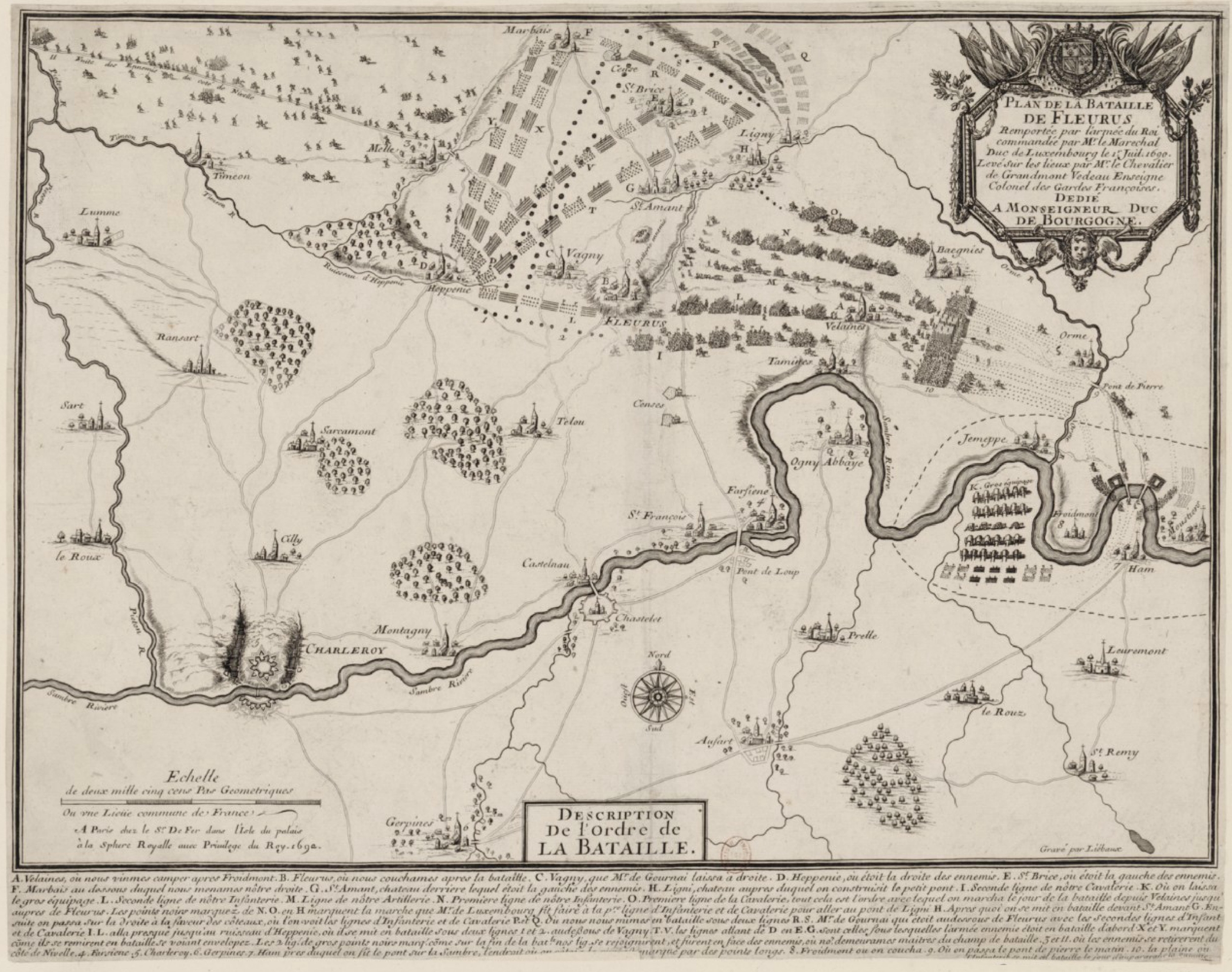 Plan de la Bataille de Fleurus. 1690